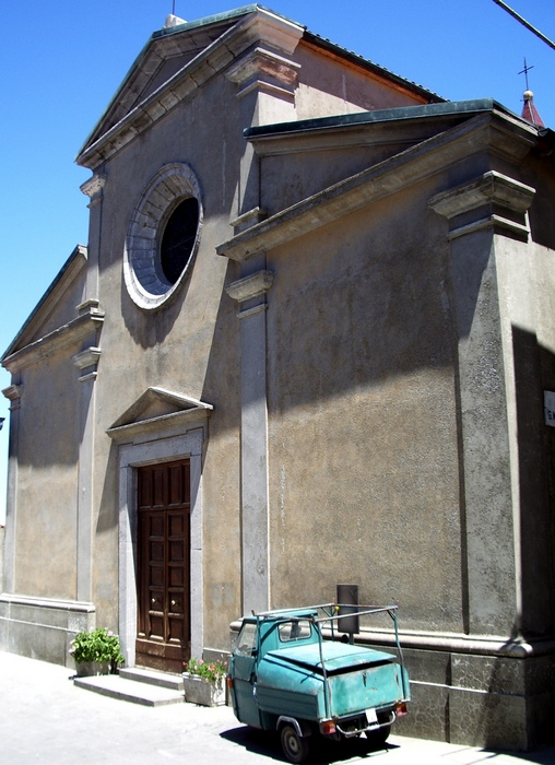 Facciata della Chiesa di San Nicola a Castell'Azzara (GR), Tuscany (Italy).